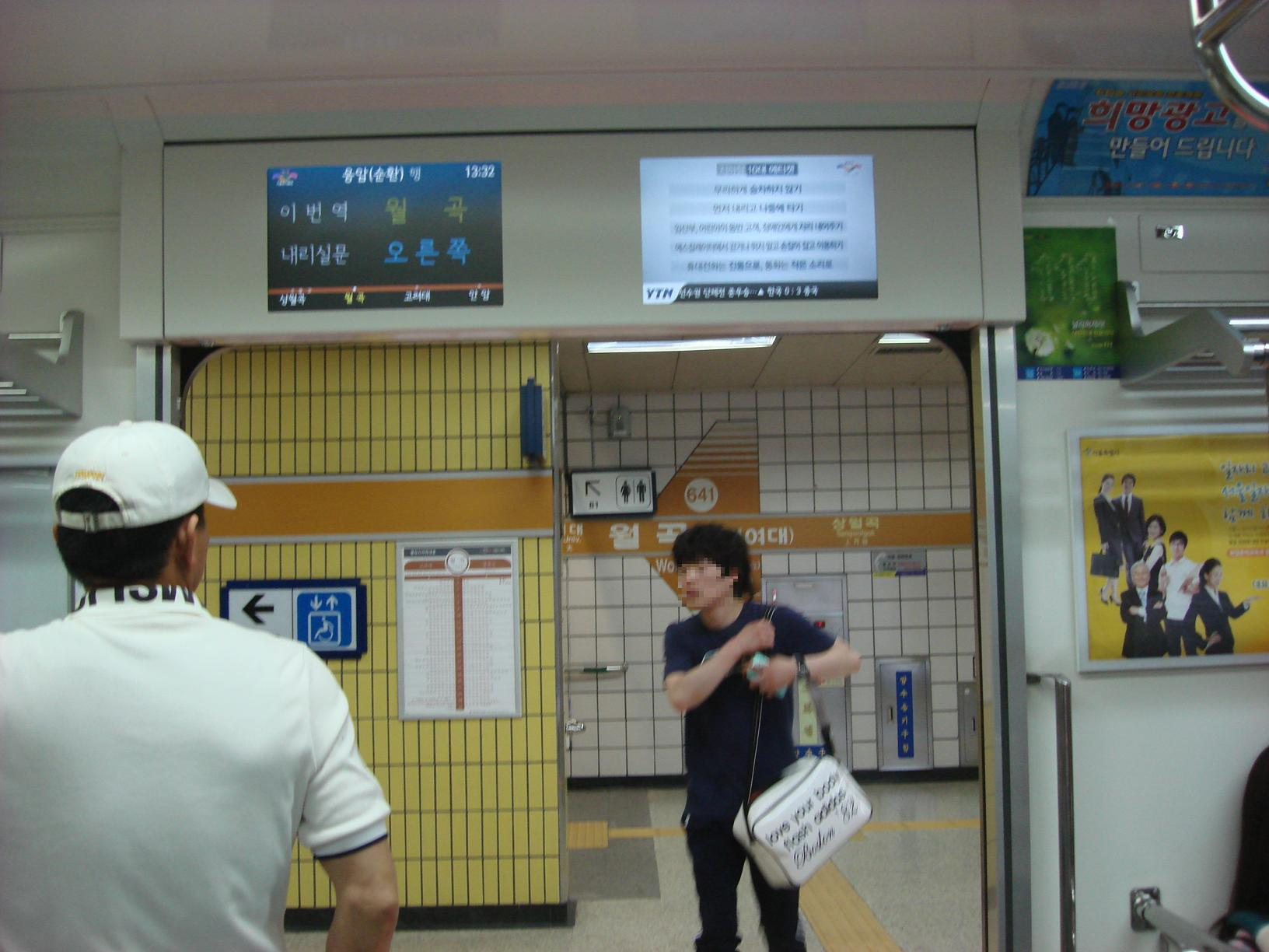 월곡역 역명판, lcd